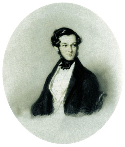 Николай Дмитриевич Киселёв (1800-1863), действительный тайный советник, русский посланник во Франции и в Италии, брат генерала Н.Д.Киселёва и С.Д.Киселёва.